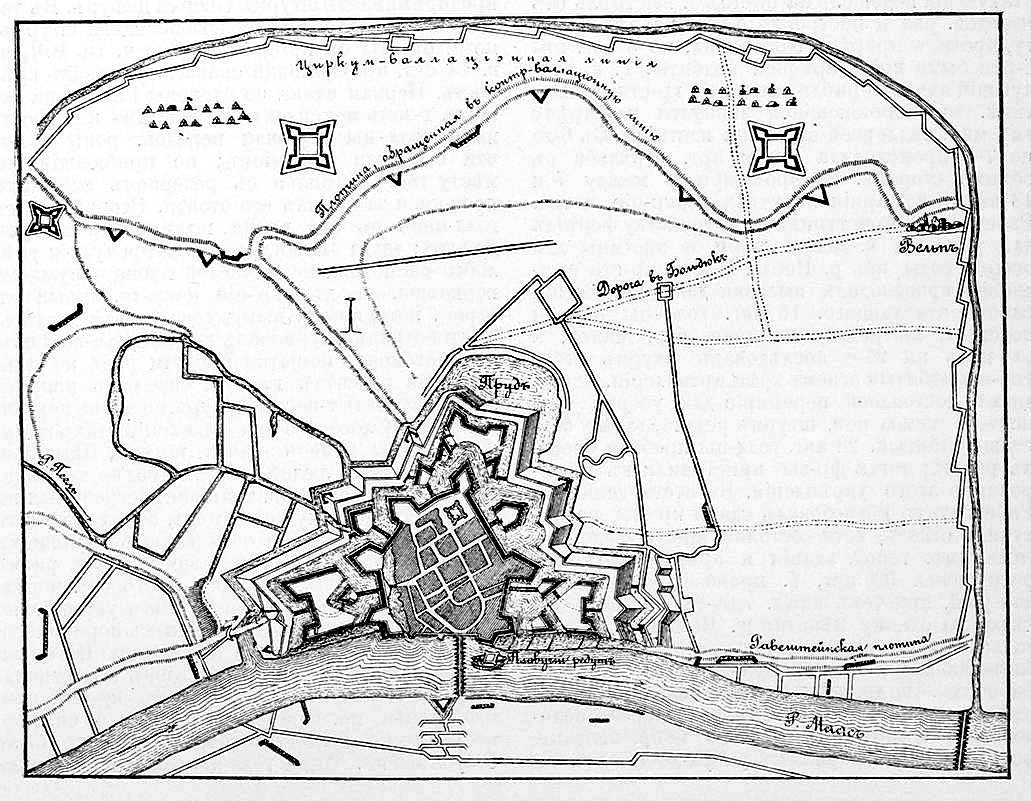 Это изо было использовано в статье «Грав» опубликованной в восьмом томе «Военной энциклопедии», который был издан книгоиздательским товариществом И. Д. Сытина в 1912 году в столице Российской империи городе Санкт-Петербурге.